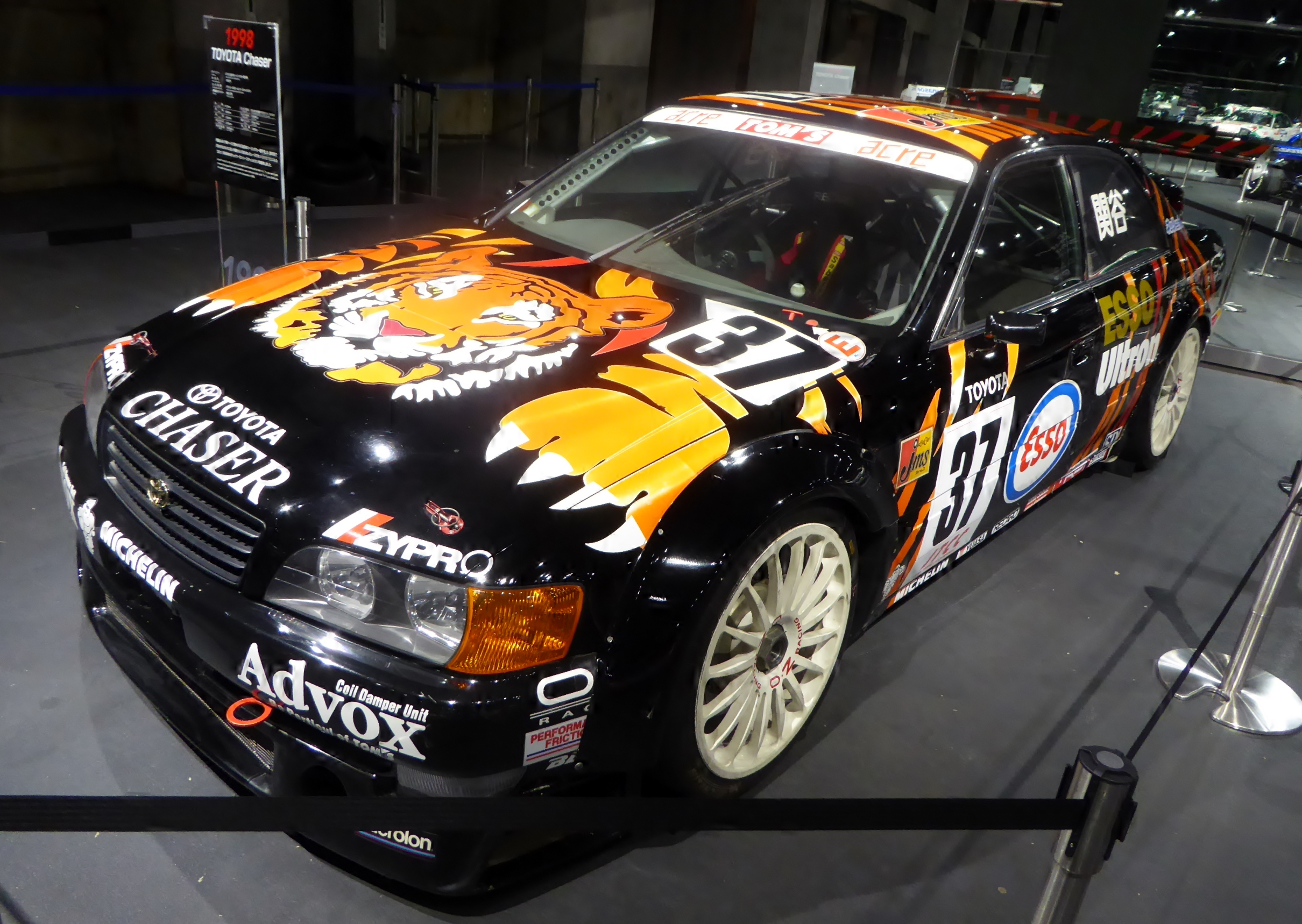 37号車エッソトムスチェイサーをフロントから撮影。